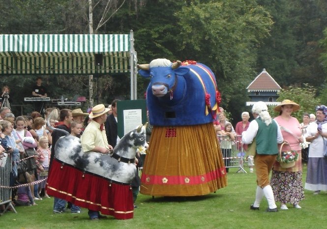 Bugnus au 20 ans du Marquis de traisnel